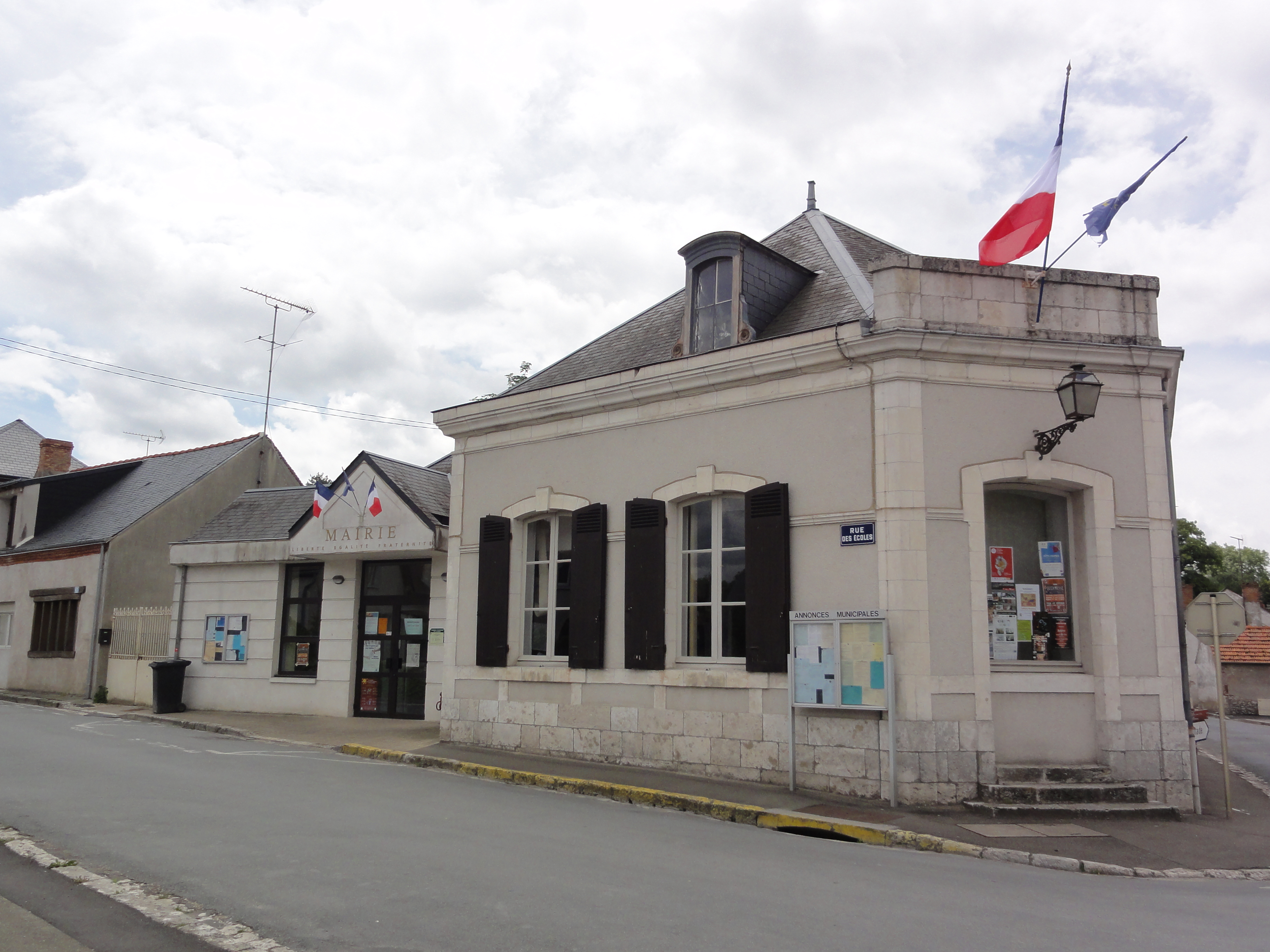 Lailly-en-Val (Loiret) Mairie Template:Mérimée\IA45000074